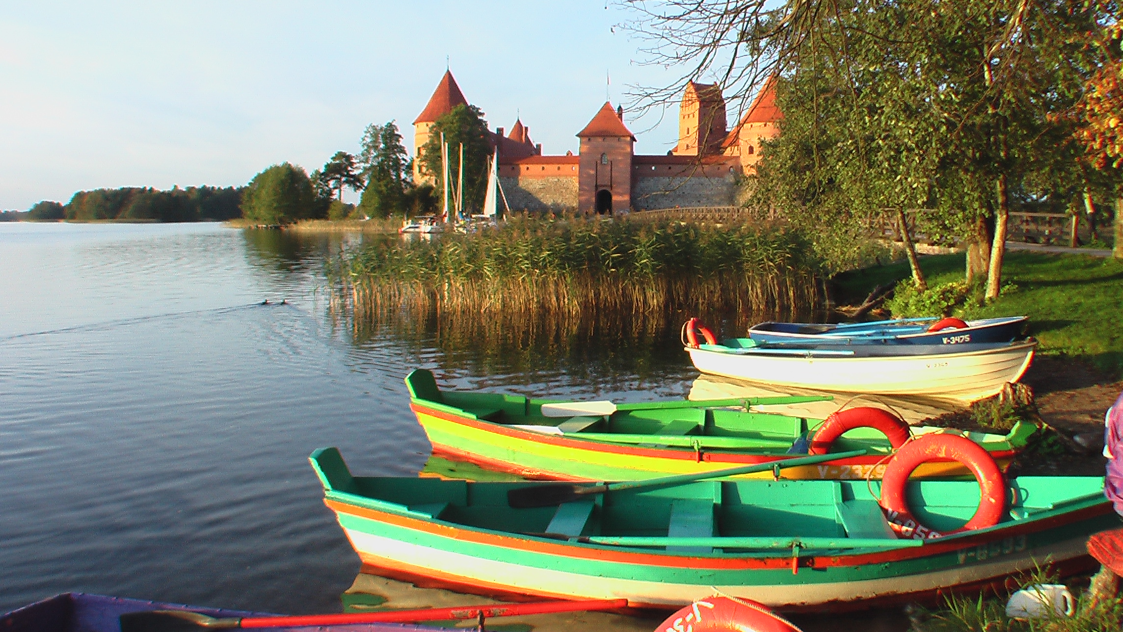 TrakaiBurg2011